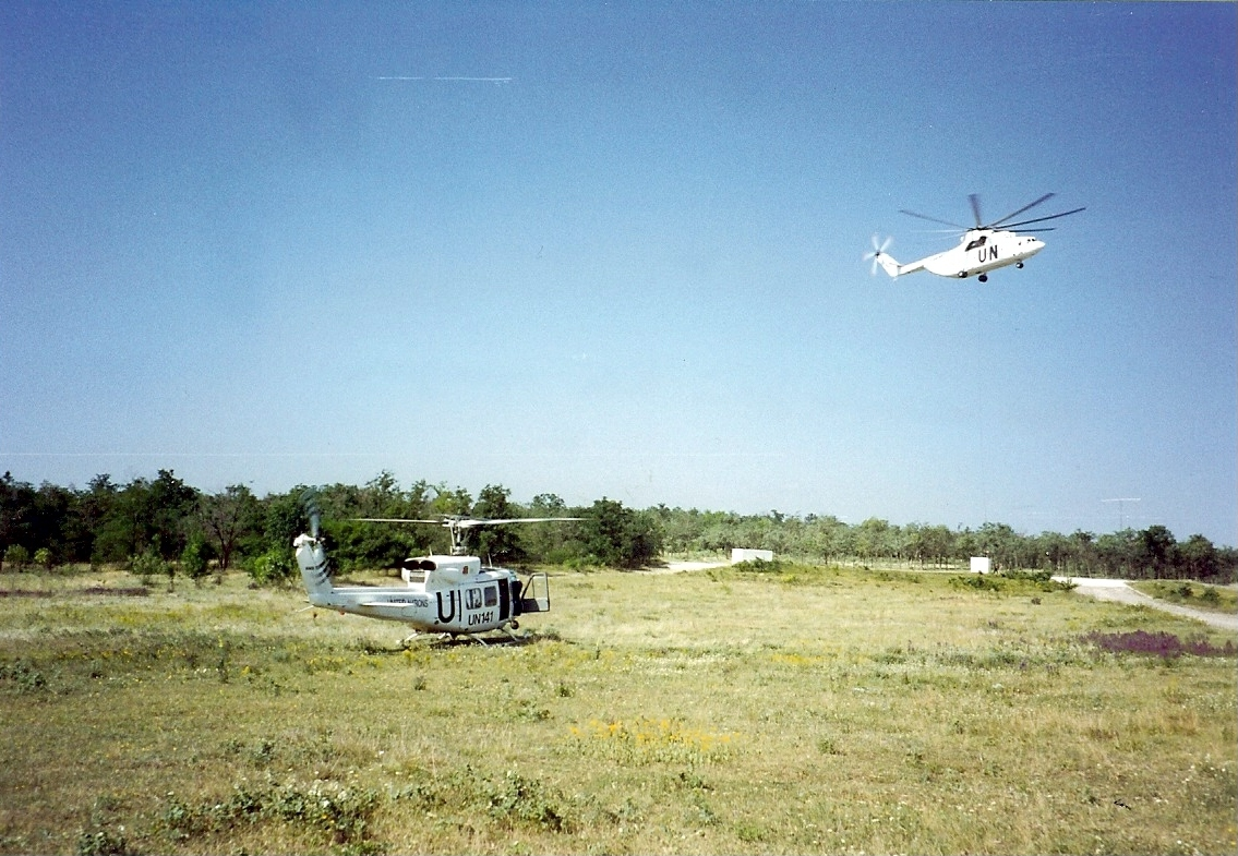 Due to difficult terrain helicopteroperations were neccesary Grunnet vanskelig terreng utnyttt man helikoptere maksialt